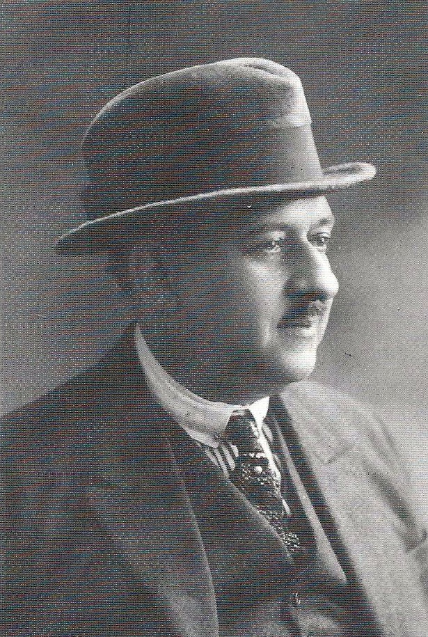 Photo semi-profil de Henri Jooris, né en 1879 et décédé en 1940